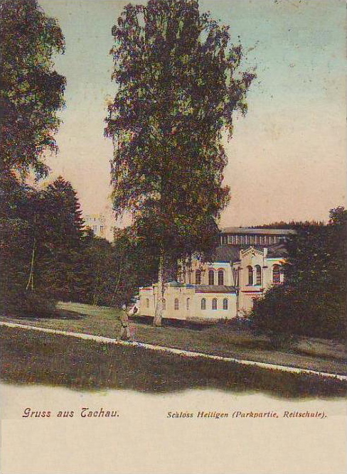 Světce, jízdárna v zámeckém parku